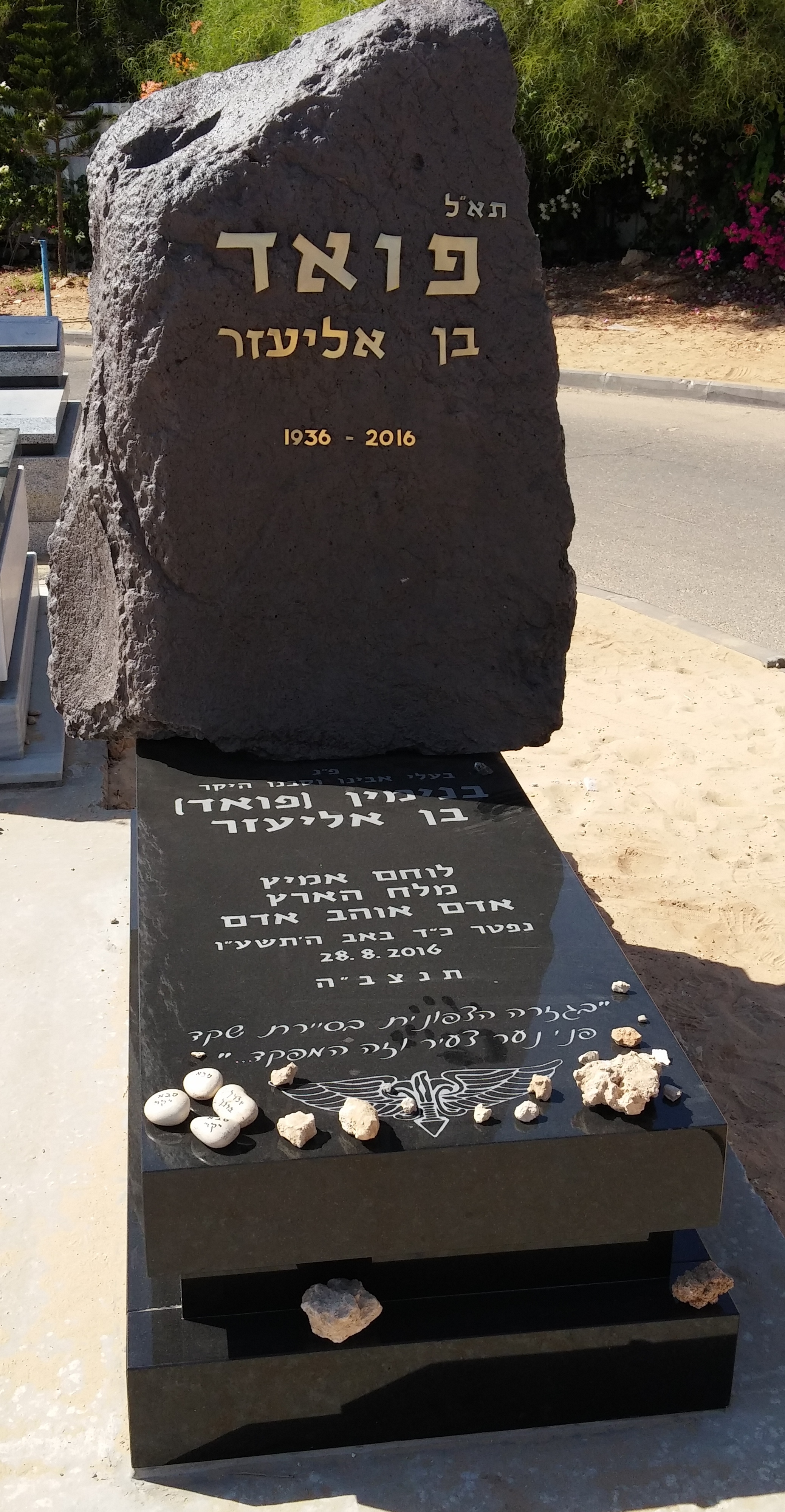 בנימין פואד בן אליעזר מצבה על קברו